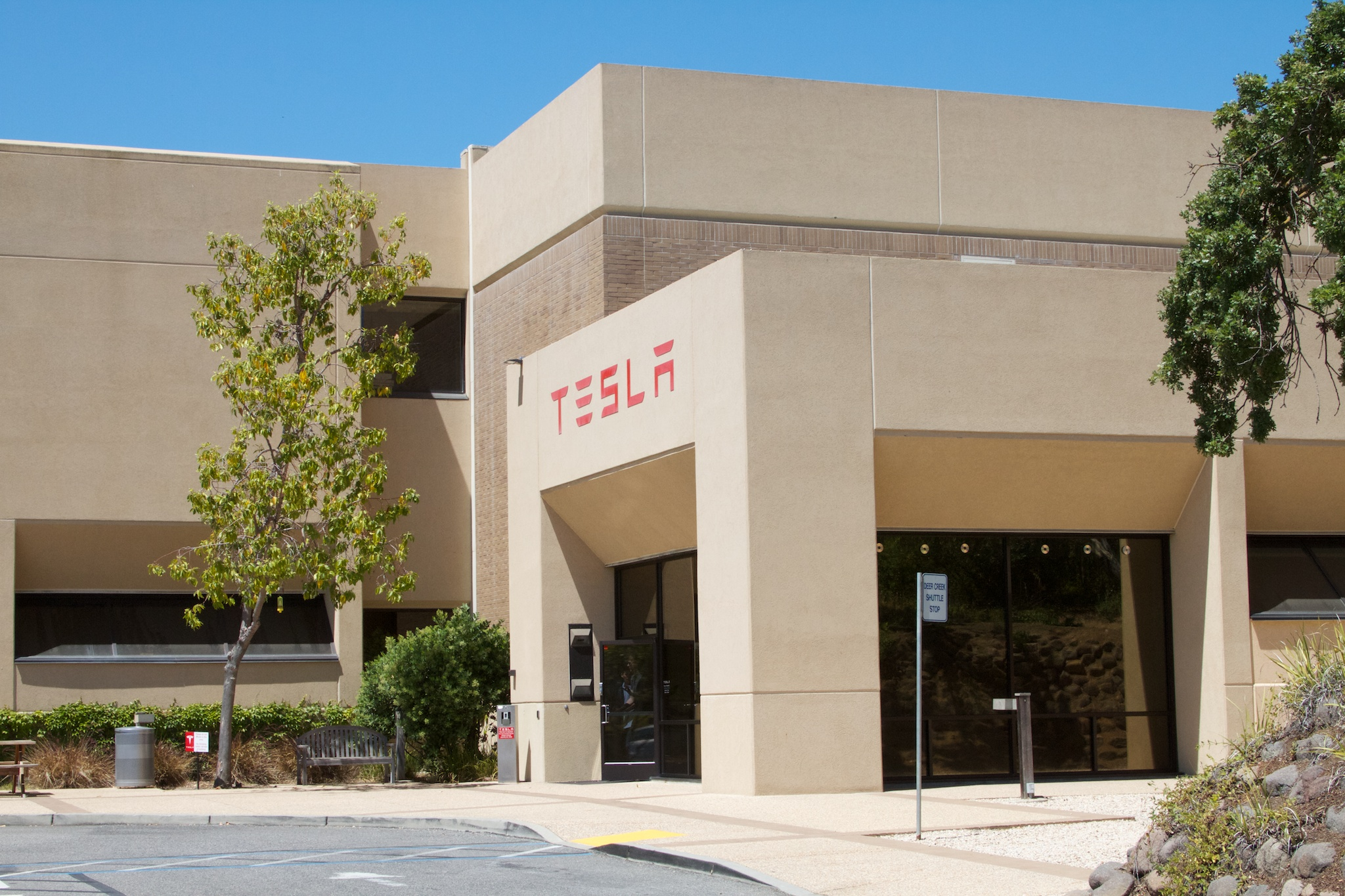 Tesla Visit 3